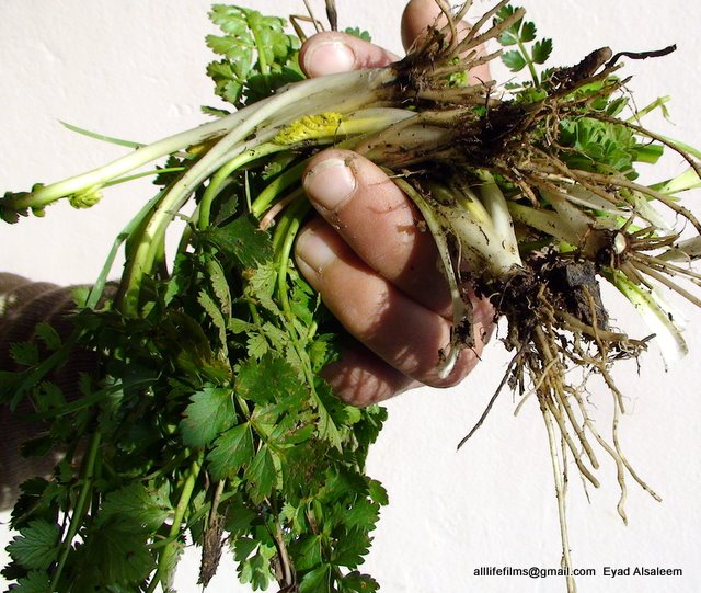 نباتات برّية سورية تؤكل